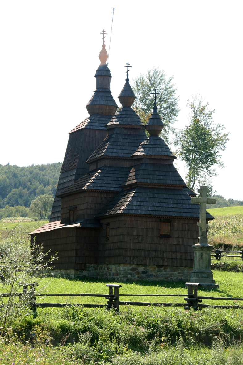 Obnovená drevená cerkva v Haburej